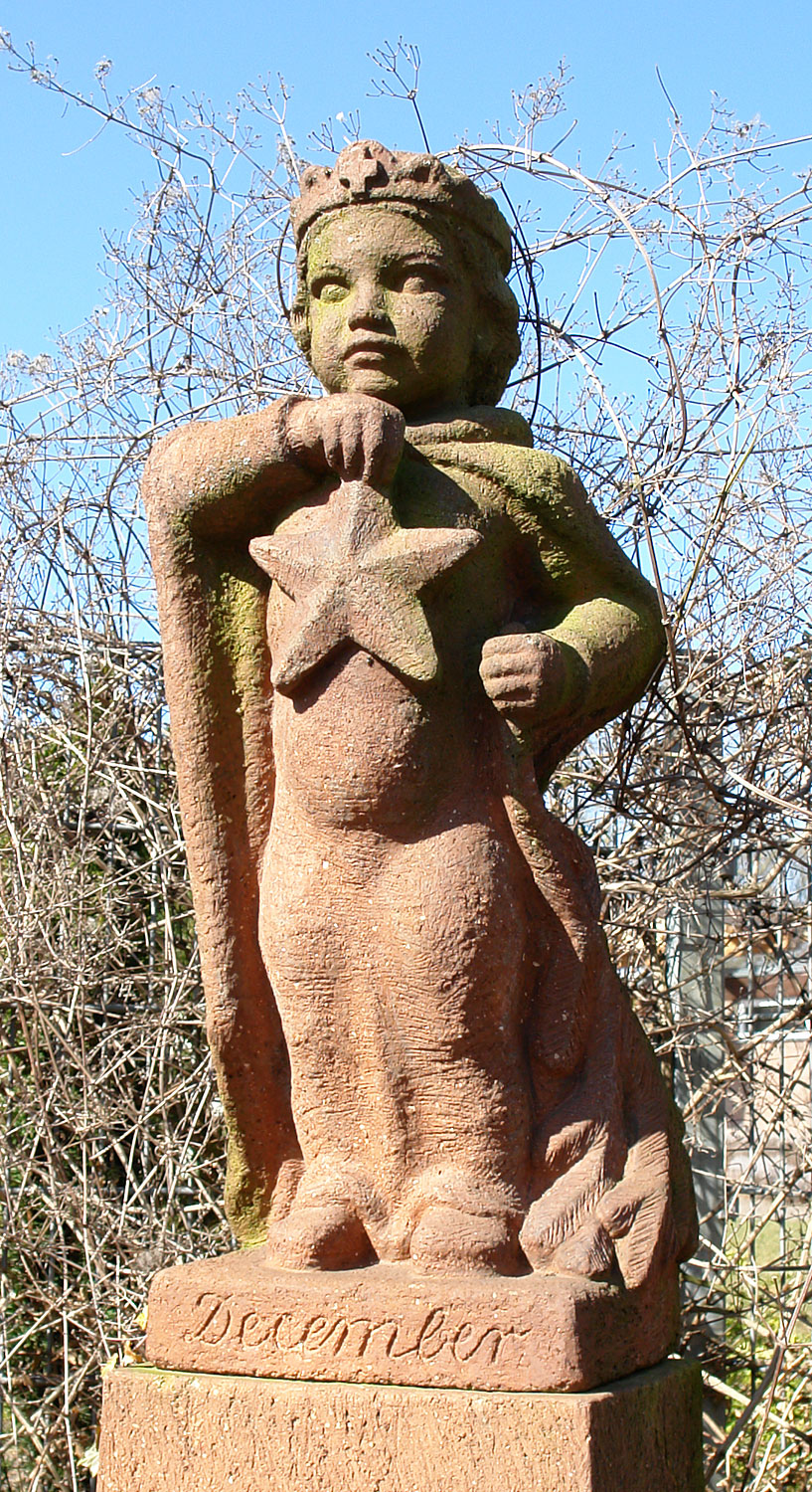 Egestorff-Stiftung in Bremen: Gartenplastik „December“ von Ernst Gorsemann. Erstellt: 1950 Das abgebildete Objekt ist ein geschütztes Kulturdenkmal in der Freien Hansestadt Bremen, mit der Nr. 0970,T009 beim Landesamt für Denkmalpflege registriert.